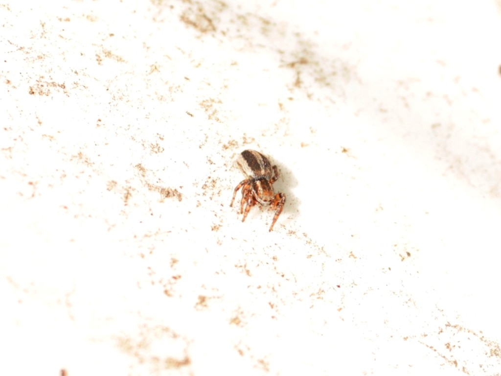 Phlegra fasciata. From Rīga (Latvia)